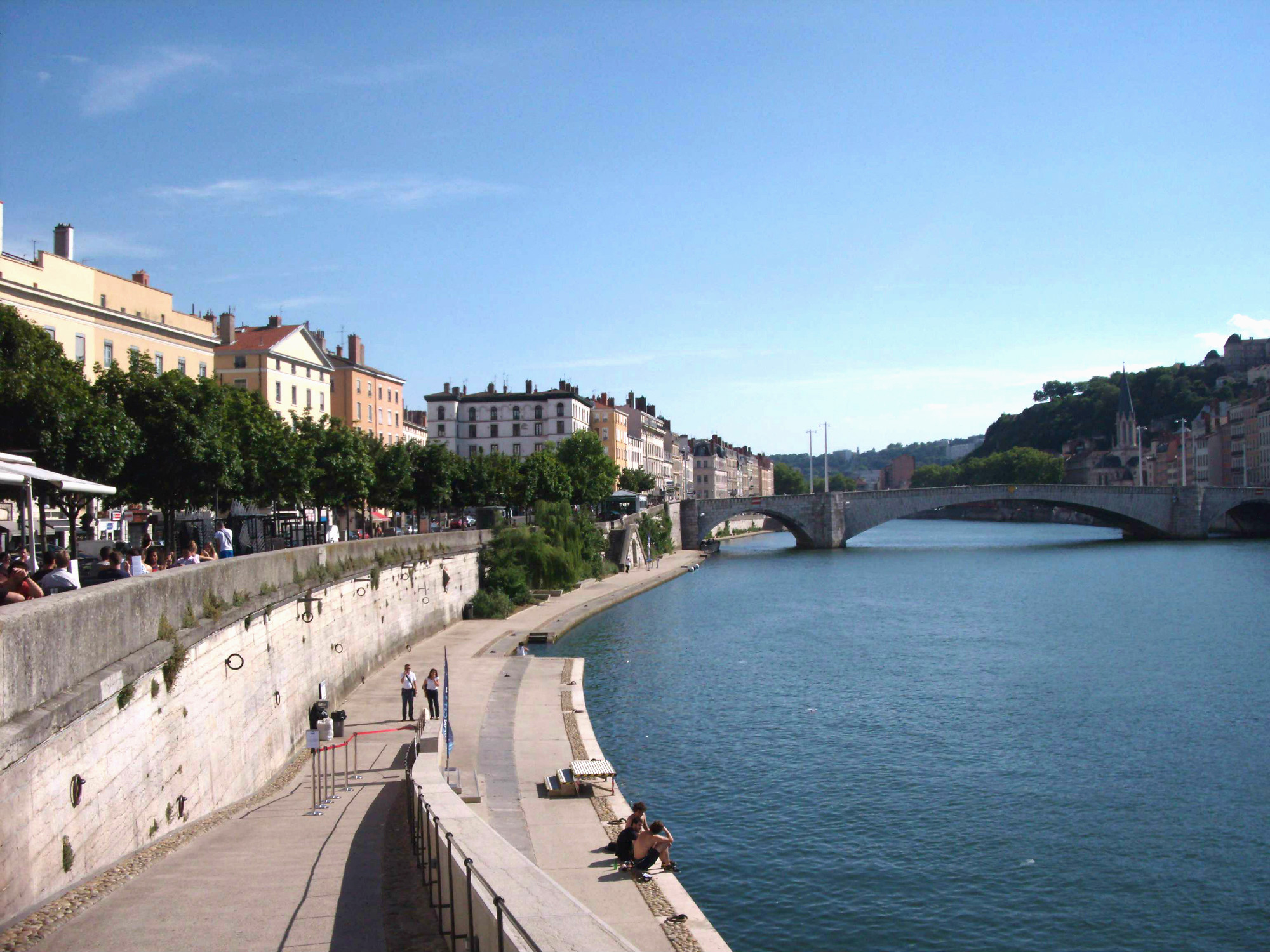 Quai des Célestins à Lyon. Au fond, le pont Bonaparte.